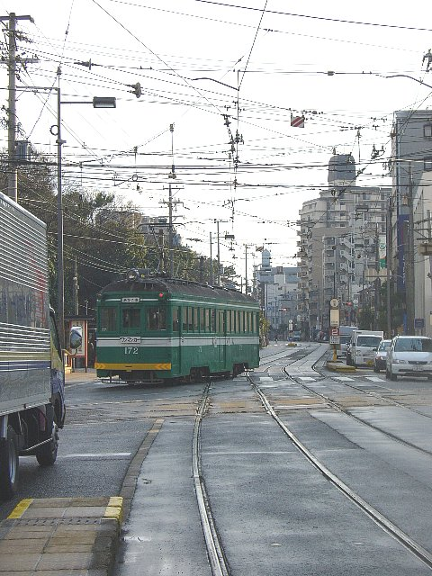 阪堺電気軌道上町線・阪堺線 住吉停留場 上町線から阪堺線へ乗り入れる我孫子道行き電車 1番線から南望